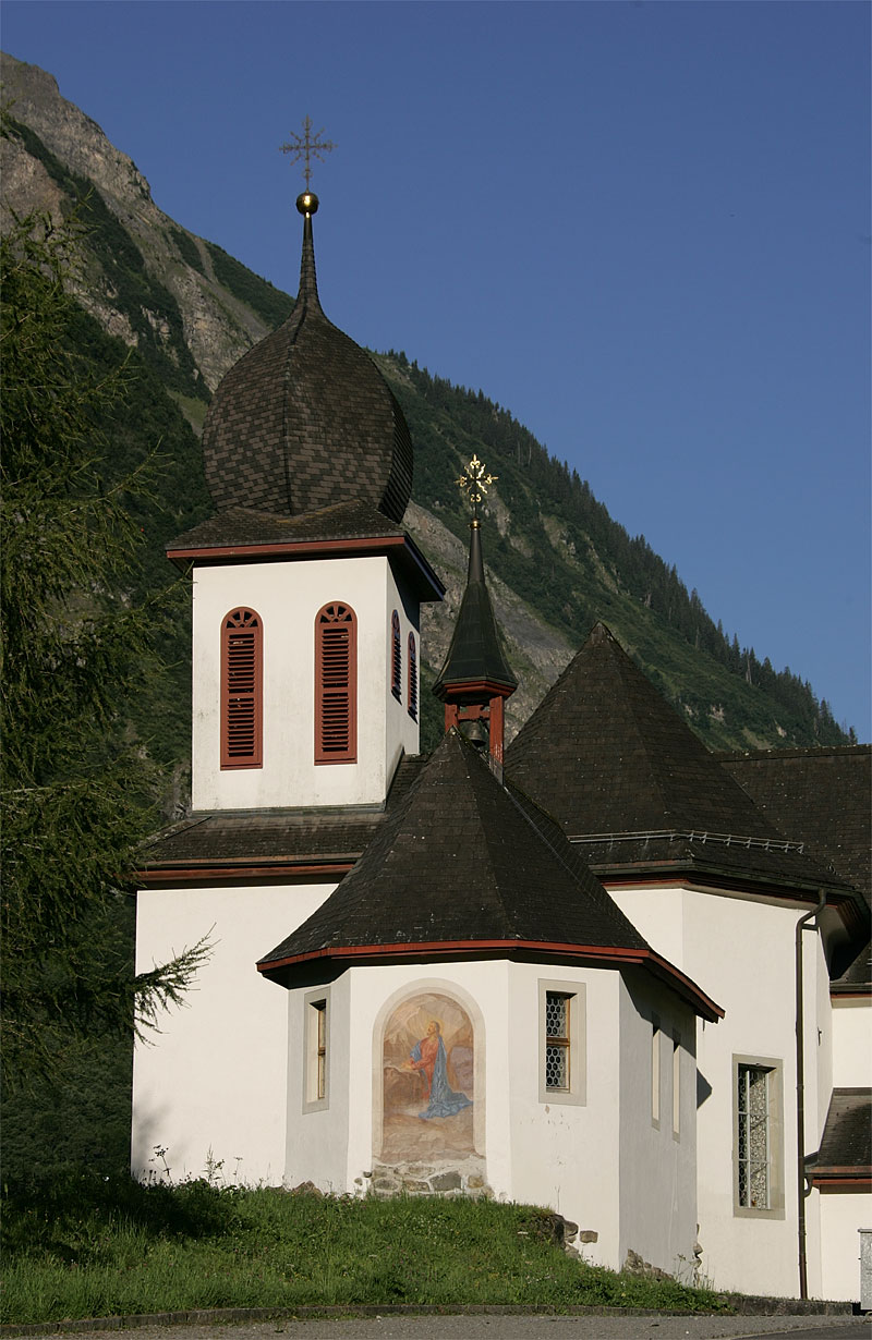 Kirche und Totenkapelle von Unterschächen